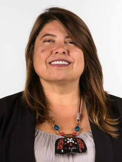 Claudia Mix Jimenez en la fotografía oficial de diputados periodo 2018-2022. (Fotos: Christel Andler, René Lescornez, Johanna Zárate)